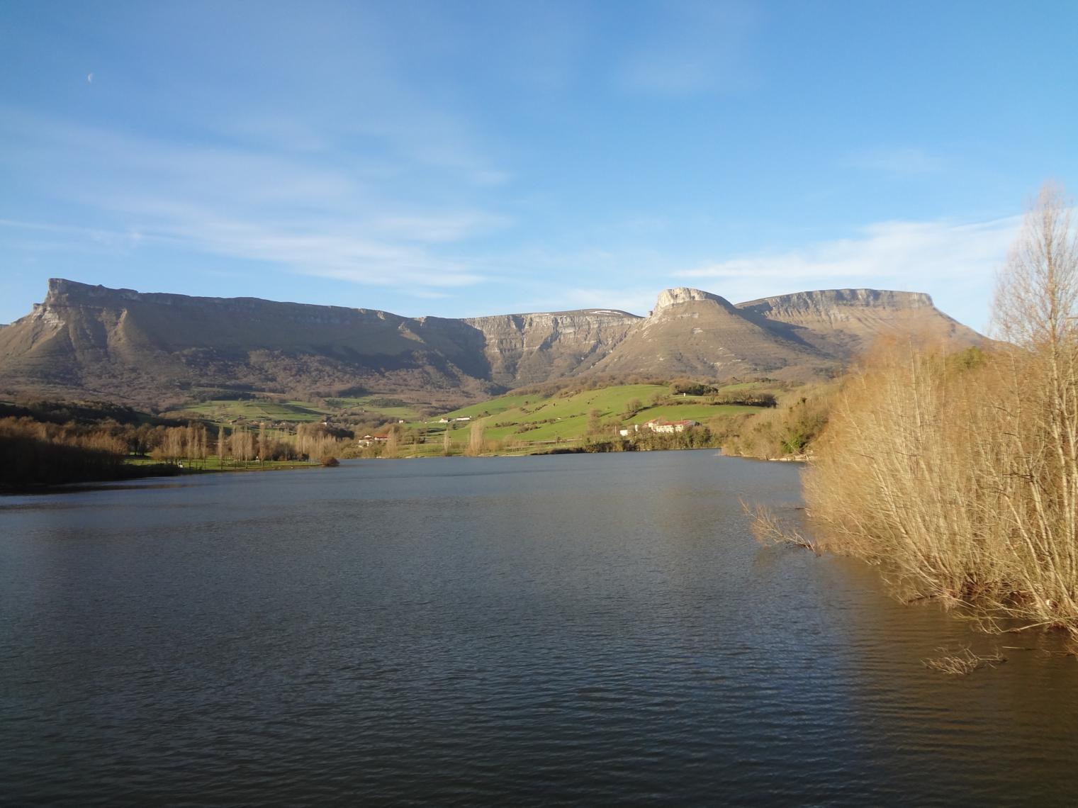 Maroñoko urtegia